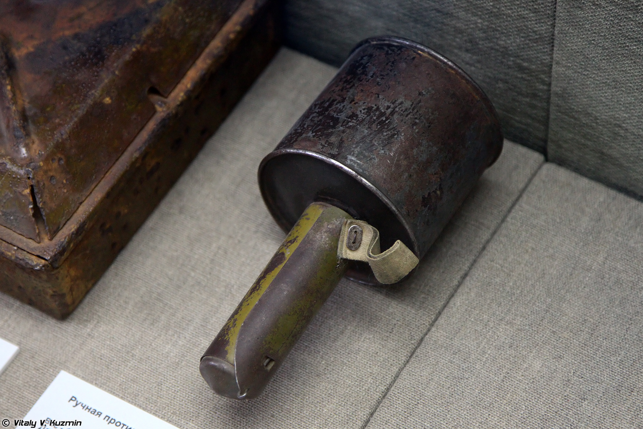 Ручная противотанковая граната РПГ-40